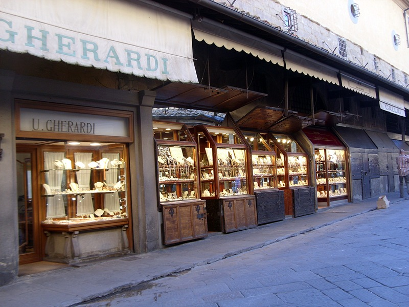 Firenze - Botteghe orafe sul Ponte Vecchio